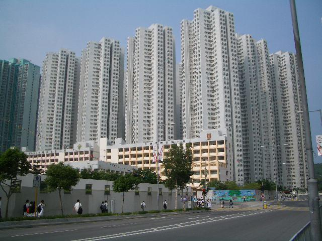 User:Kwan Zheung Laonnie: 將軍澳 Tseung Kwan O, Hong Kong